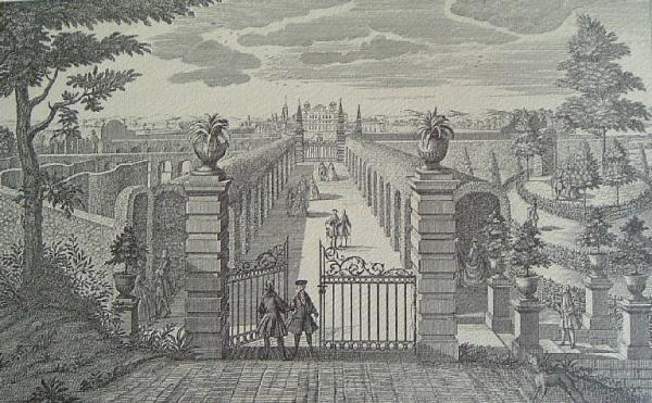 Villa Ghirlanda Silva, incisione di Karl Remshart raffigurante il parco.